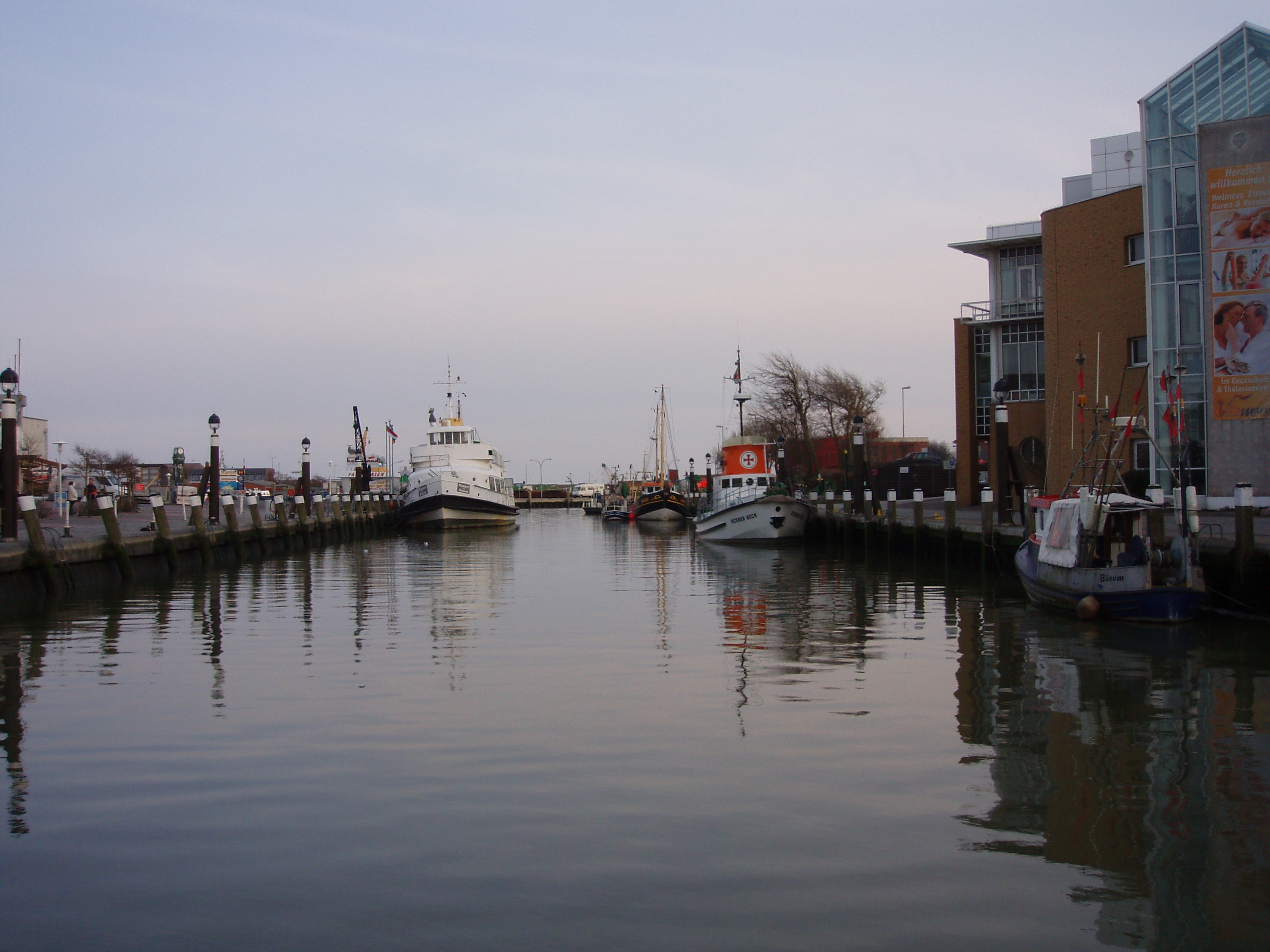 Museumshafen Büsum